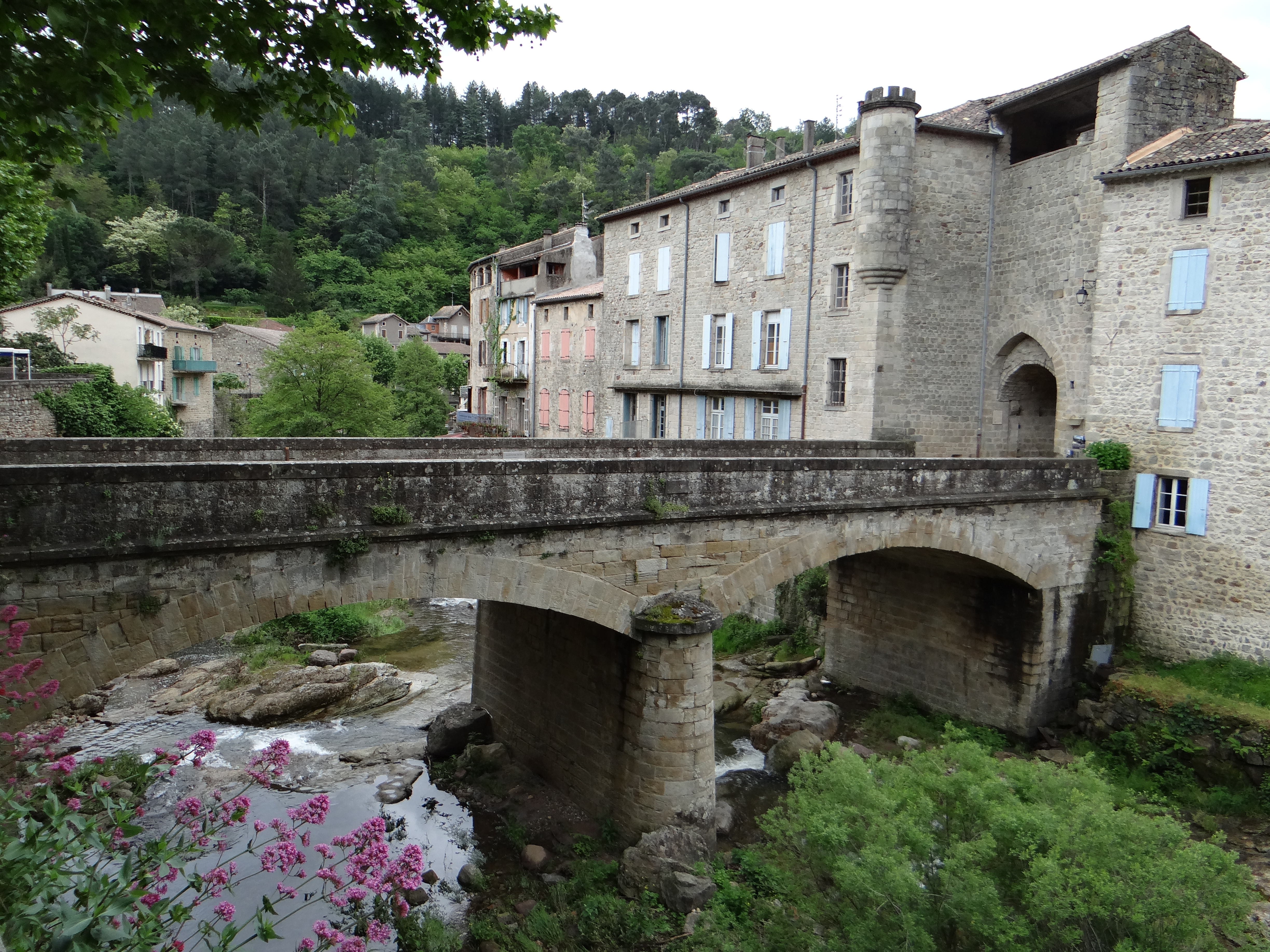 Largentière - Pont et porte des Récollets